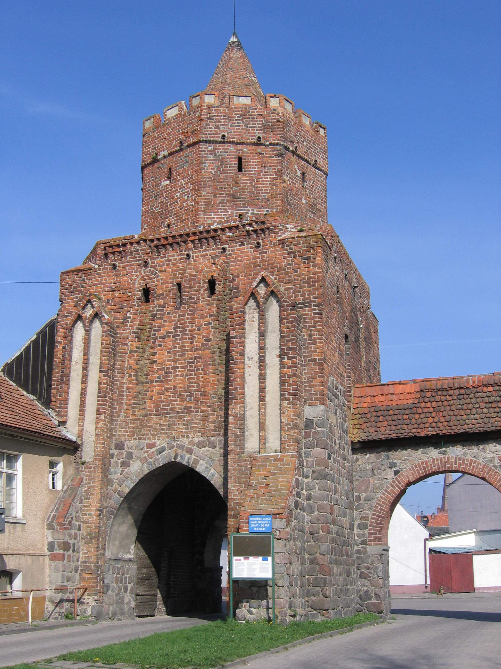 Trzcińsko-Zdrój - Brama Myśliborska w zespole obwarowań miejskich